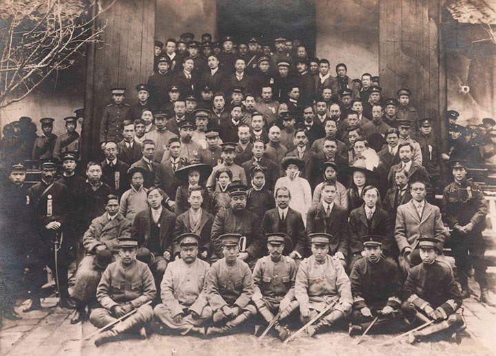 1912年4月9日，孙中山应鄂军都督黎元洪之邀抵达武汉。图为孙中山在武昌都督府与欢迎人员合影。第二排左起：孙科、李晓生、胡汉民、黎元洪、孙中山、汪精卫、章士钊、景耀月；第三排右2廖仲恺、右3吴若男（章士钊夫人）、右5宋霭龄、右6孙婉、右7孙娫；第五排右1黄大伟。照片由武昌华东照相馆拍摄。